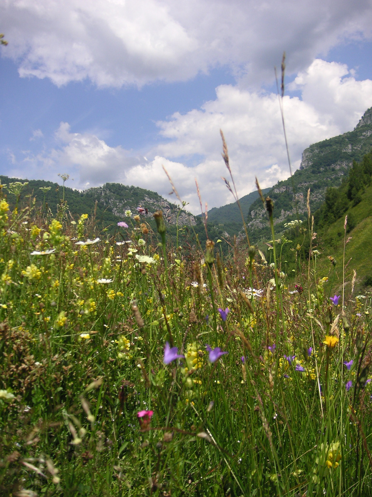 Vegetatie din Muntii Sureanu-Petrila-Hunedoara-Romania.